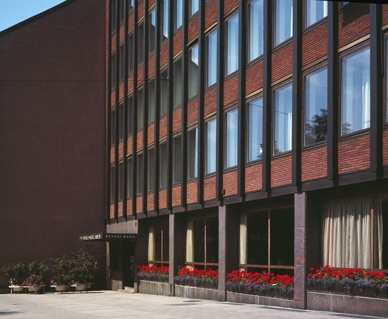 Fasaden av fastigheten "Sjökalven 25" på Storgatan 5 sedd från hörnet av Jungfrugatan. I gatuplanet restaurang "Östermalmskällaren". Arkitekt Anders Tengbom.